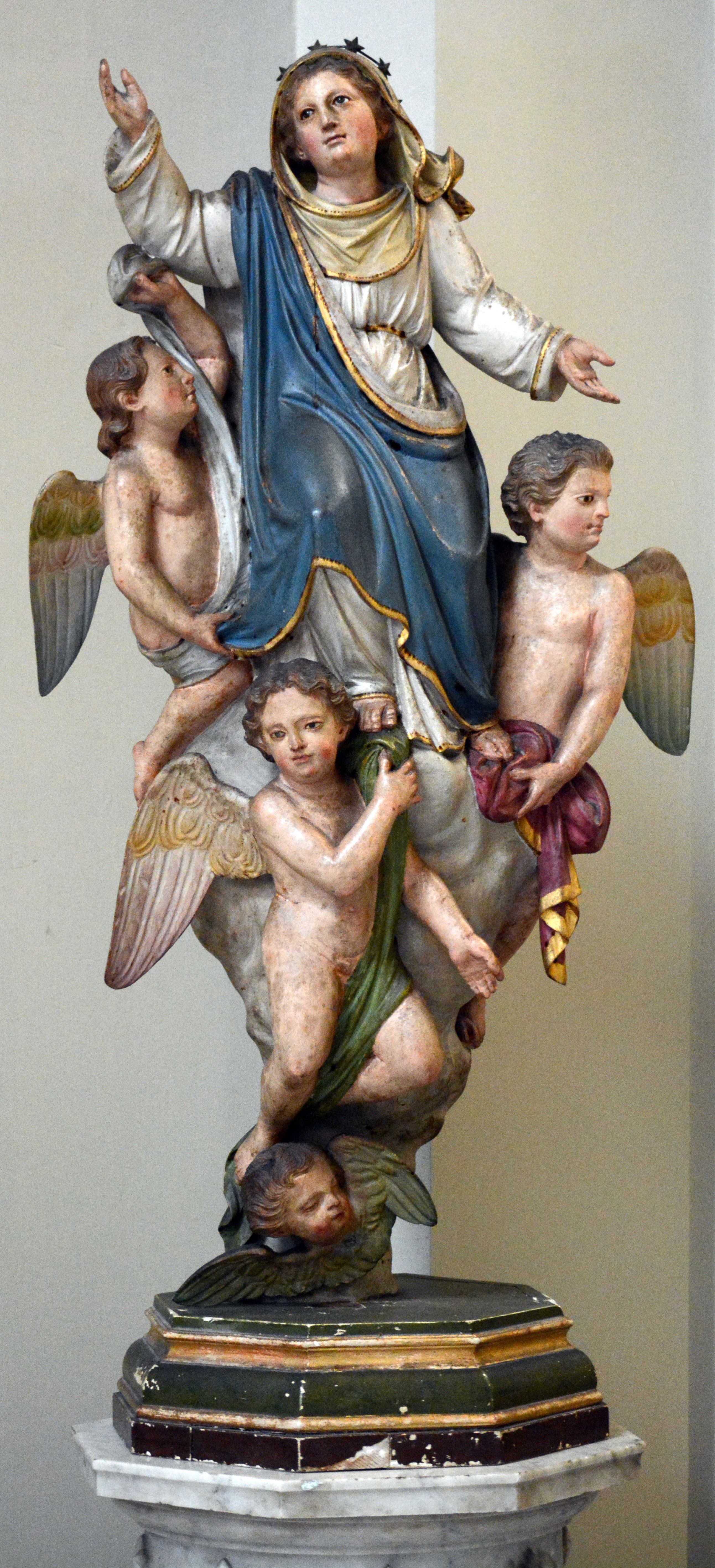 Statut de la Vierge Marie portée par des angelots_Cathédrale Sainte Réparate_Nice (Alpes-Maritimes, Sud de la France) ; bois peint ; osée sur socle de marbre blanc.